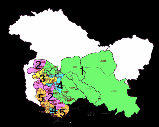 J & K Assembly election 2014